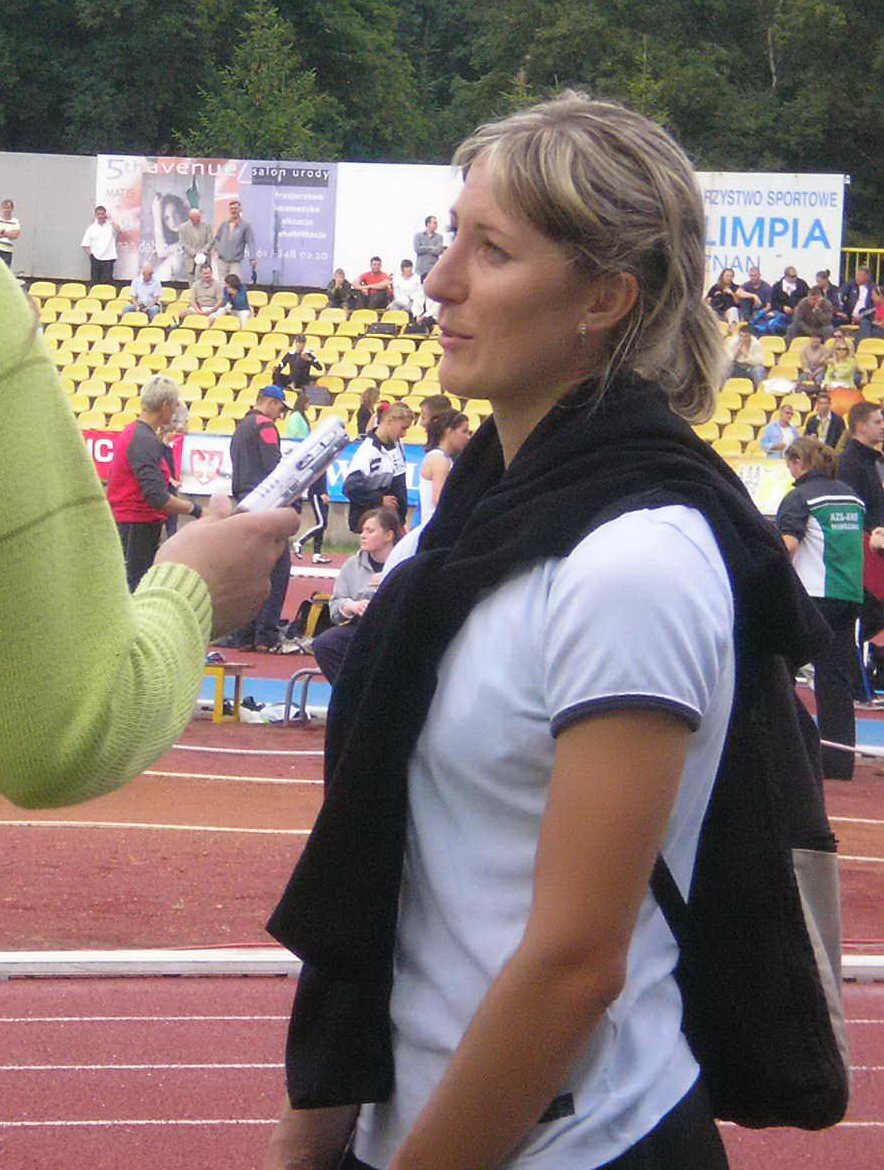 Daria Onyśko Korczyńska na Mistrzostwach Polski seniorów w lekkiej atletyce - Poznań 2007